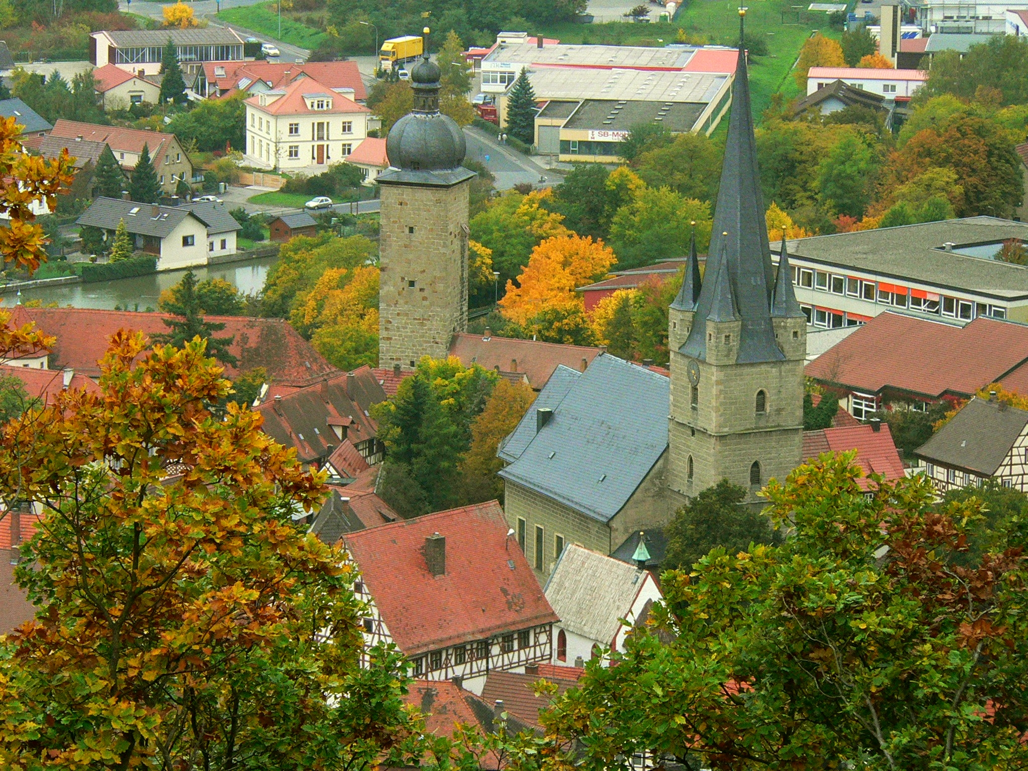 Zeil am Main (Bayern) - Ortsansicht von der Marienkapelle aus